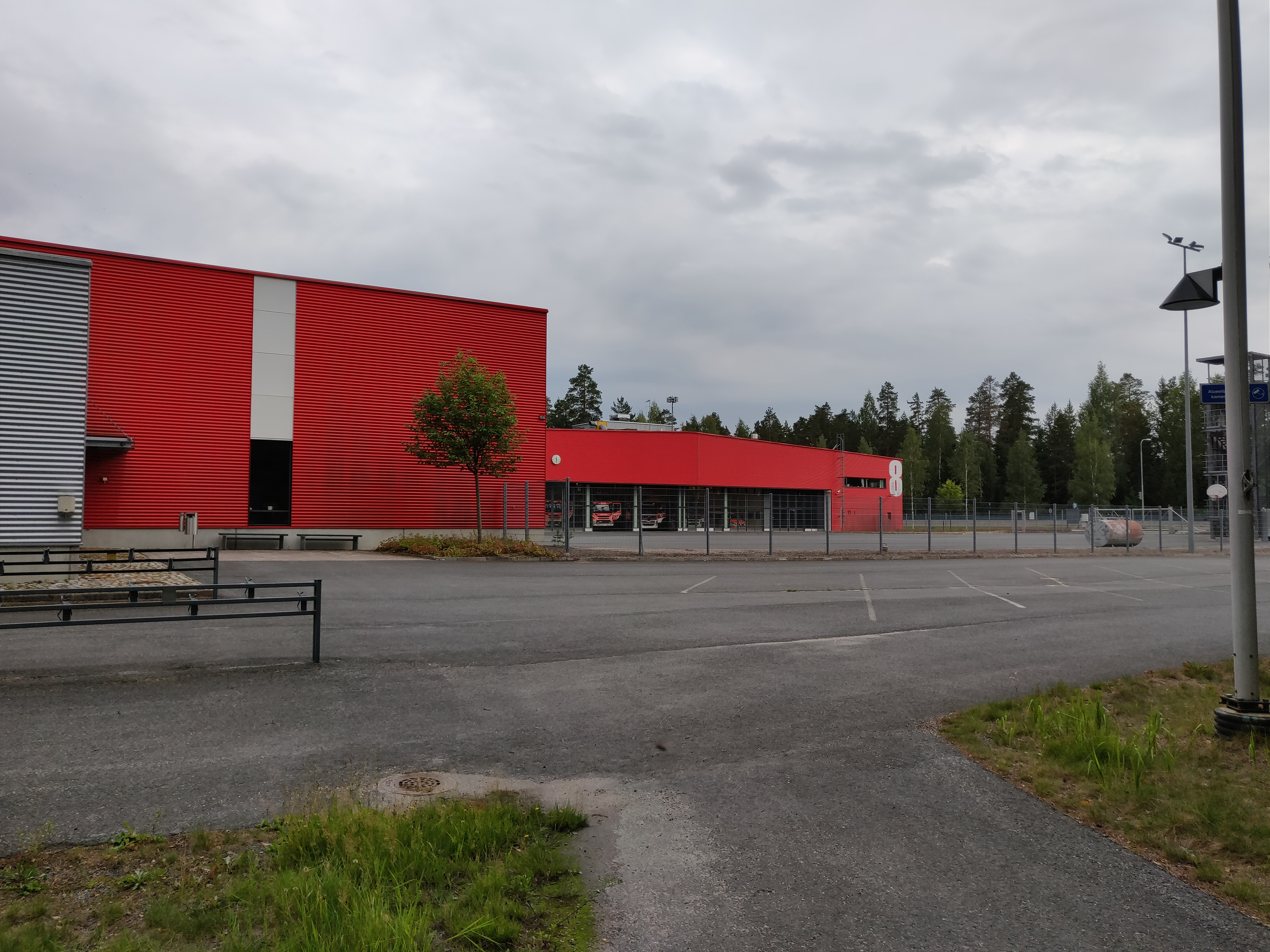 Hyvinkään paloasema